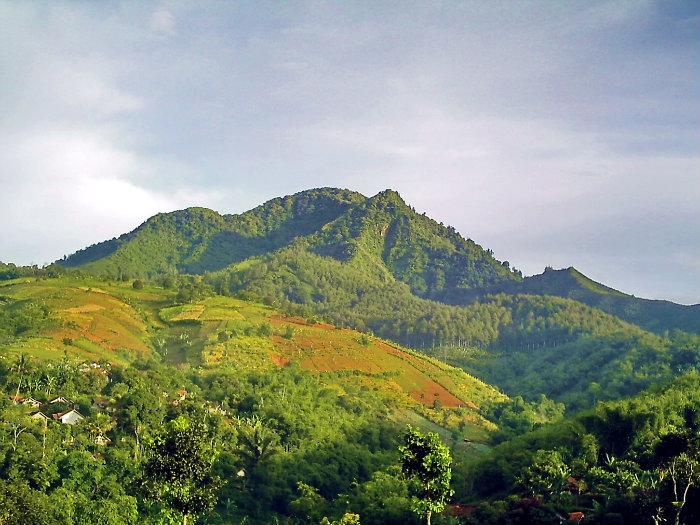 Mont Manglayang 1835m